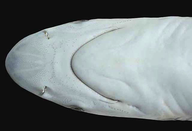 Rhizoprionodon terraenovae, Florida